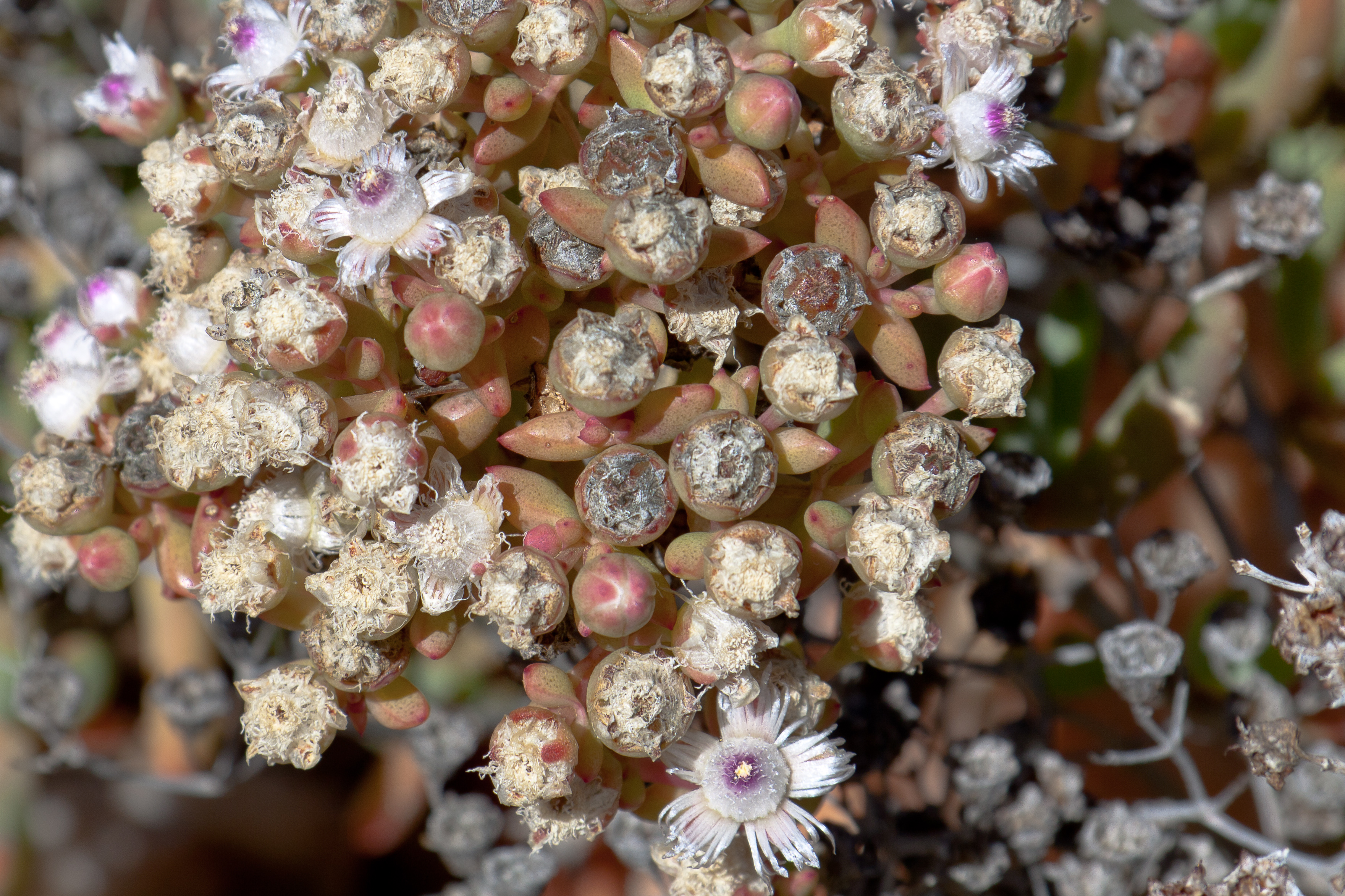 Mittagsblume, Stoeberia fructescens (L.Bolus) van Jaarsv., Goegap Nature Reserve, Nordkap, Südafrika